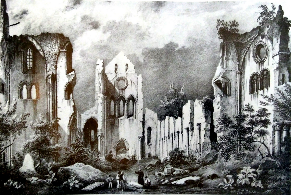 Mortemer, Ancienne abbaye. Vue intérieure de l'église, du choeur vers la nef. Enfantin del. Litho de G. Engelmann, dans Taylor et Nodier, Voyages pittoresques et romantiques.